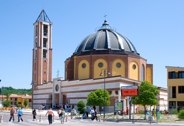 Seguendo una antica tradizione l'ultimo sabato di maggio le ragazze di Sant'Andrea di Conza si recano in processione alla Cattedrale di Conza per onorare la Madonna della Gaggia (Acacia). Il simbolo del pellegrinaggio è il fazzoletto bianco in testa e la coroncina di uva spina. Wikipedia: Sant'Andrea di Conza; Conza della Campania.